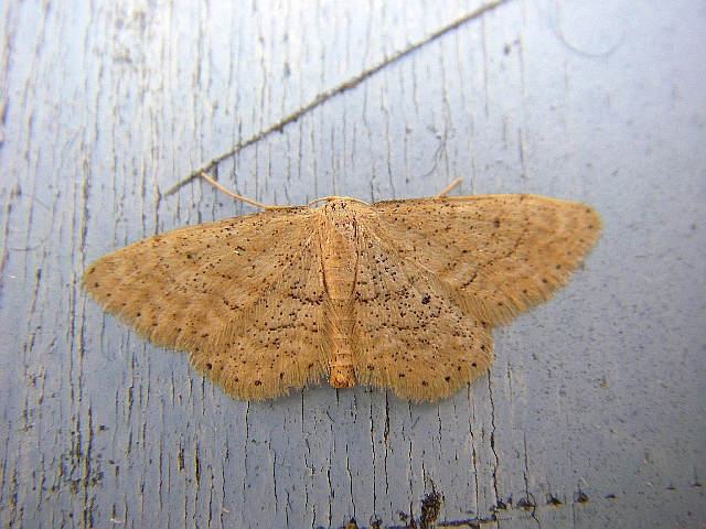 Idaea sylvestraria. Location: France - Languedoc Rousillon